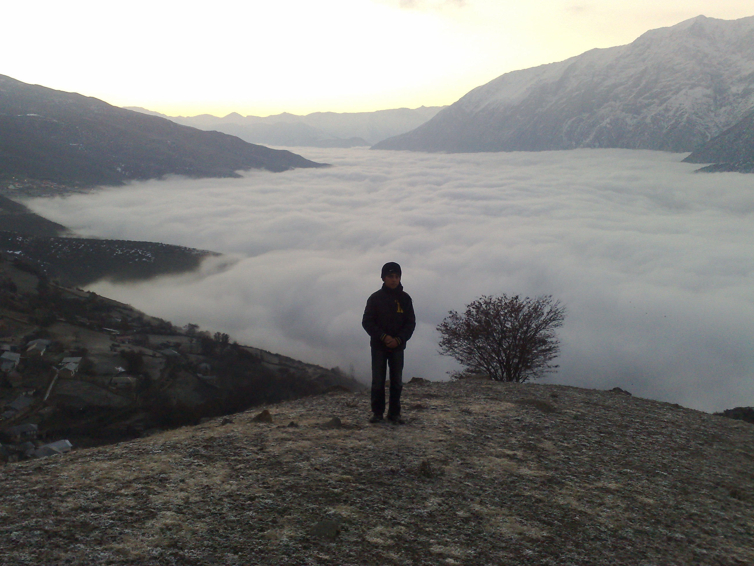 روستای ابری جاده هراز